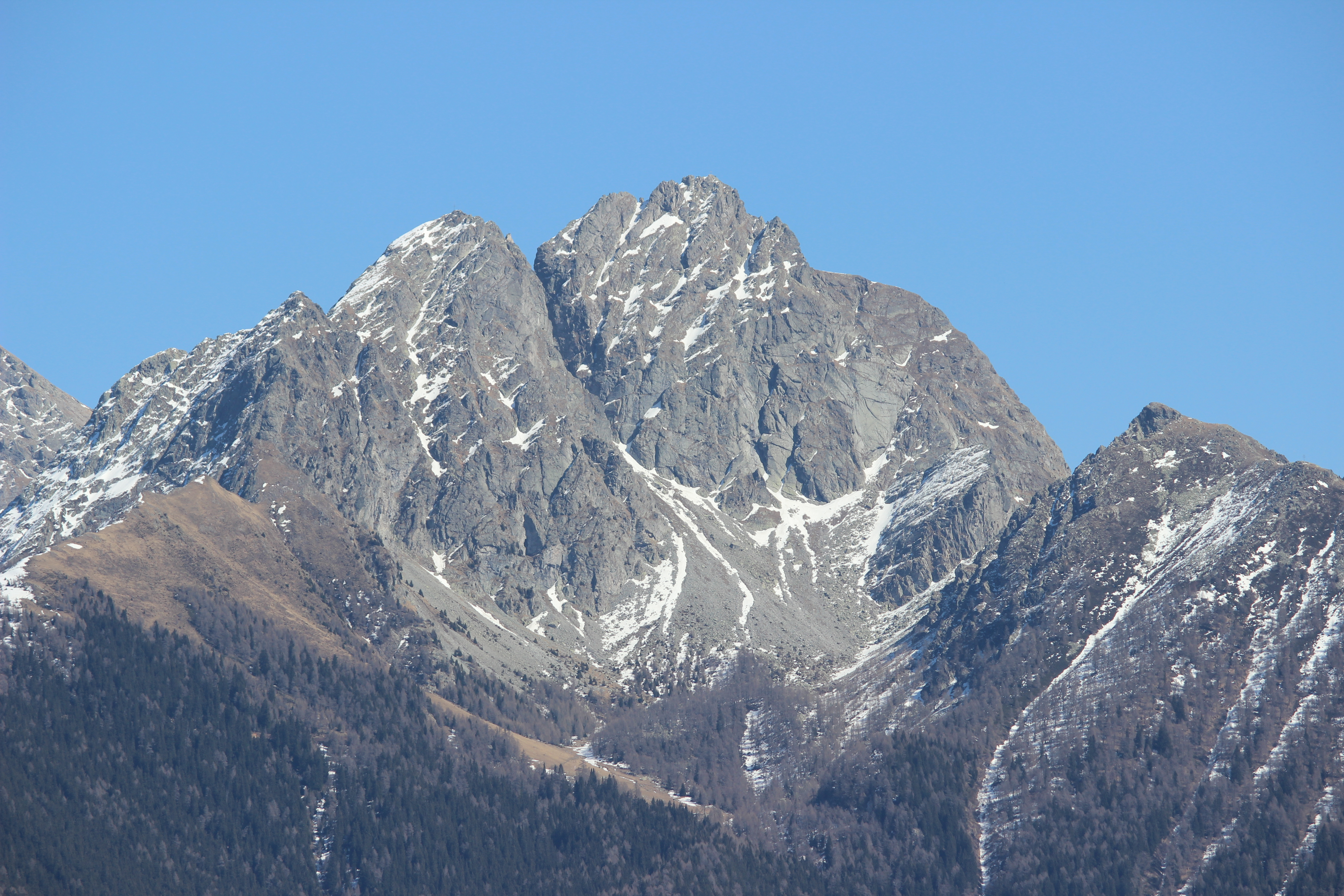 Der Ifinger (2581 m.) in den Sarntaler Alpen - Hausberg von Schenna - Westansicht